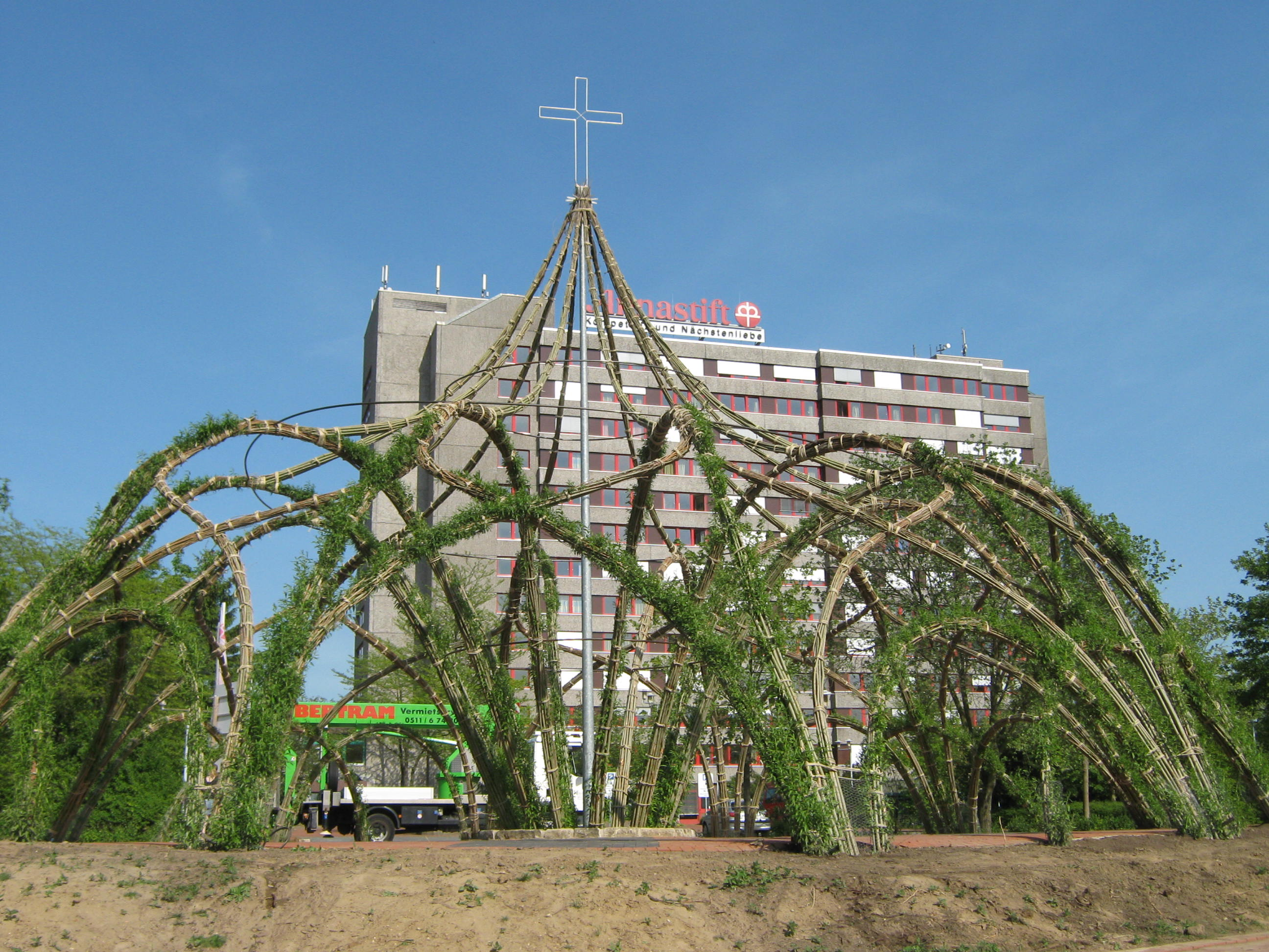 Annakirche Hannover